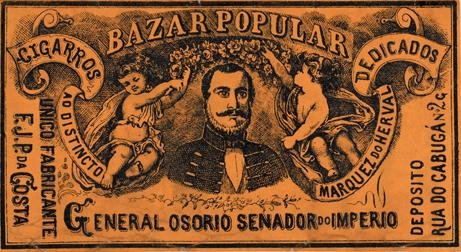 Rótulo de cigarro. Cigarros Dedicados ao Distinto Marquês do Herval, General Manuel Luís Osório. A coleção Brito Alves é composta de 1 252 rótulos de cigarros na técnica litográfica. Foi iniciada pelo comerciante Vicente de Brito Alves e continuada pelo seu filho, o advogado pernambucano José de Brito Alves (1887-1963). Em 1964 a coleção foi doada pela família ao então Instituto Joaquim Nabuco de Pesquisas Sociais. Constitui-se em um raro e valioso patrimônio cultural e artístico, registrando fatos históricos, usos, costumes e aspectos da vida cultural da sociedade brasileira e particularmente da pernambucana, no final do século XIX até as primeiras décadas do século XX.